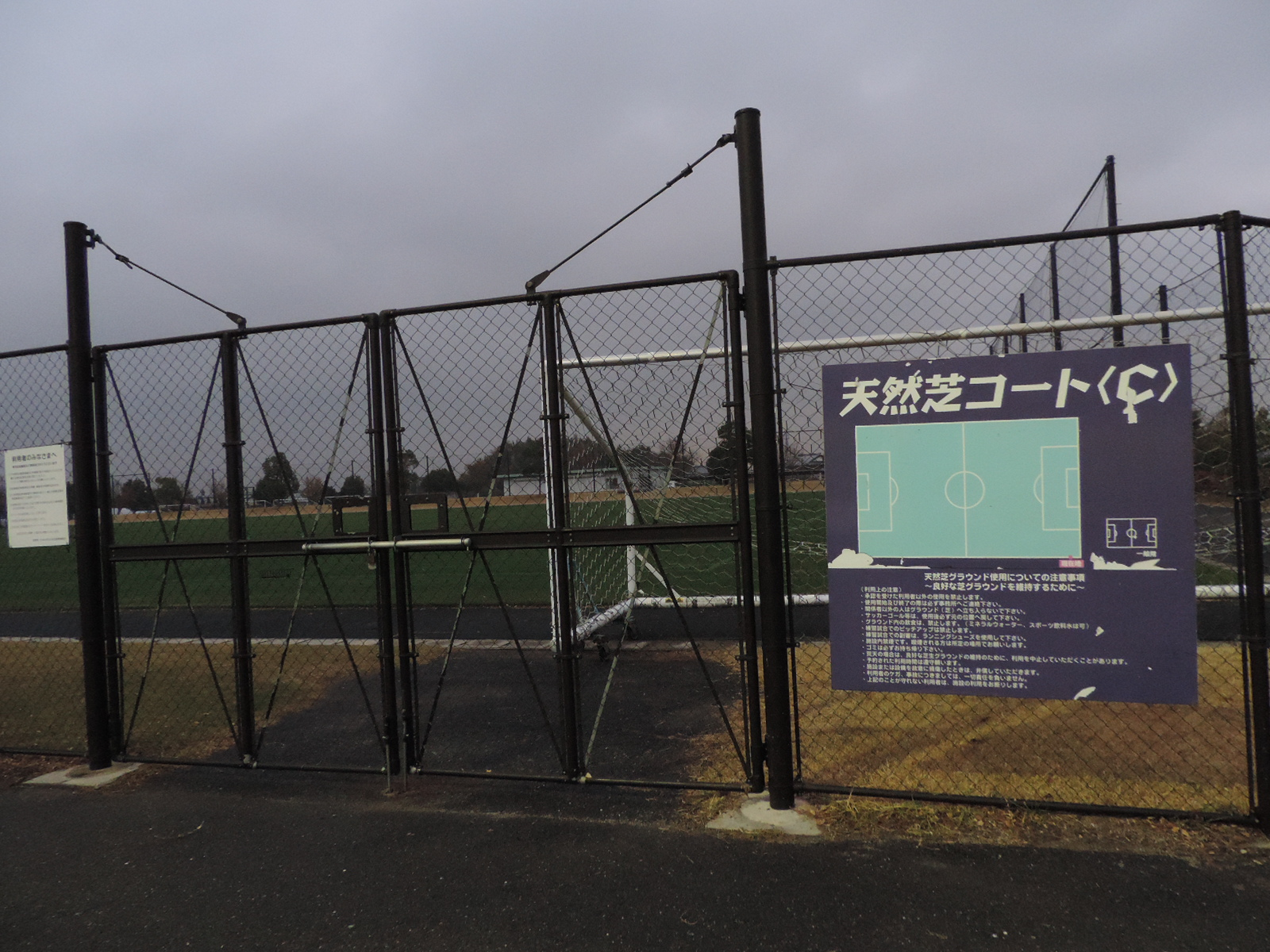 「ビッグレイク」サッカーコートC